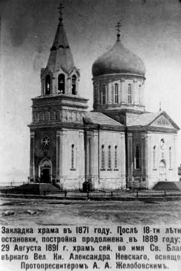 Храм Святого Александра Невского, г.Петровск-Порт